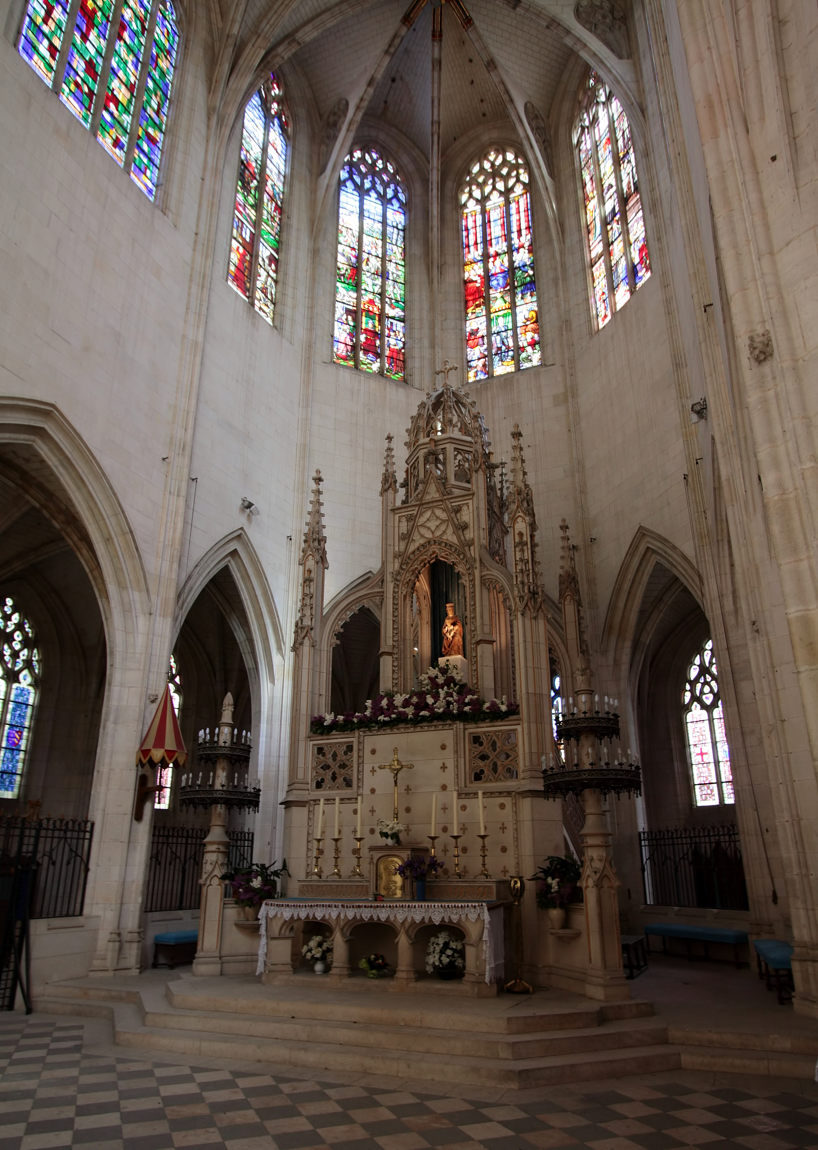 Kirche Notre-Dame de Cléry in der Gemeine Cléry-Saint-André, Département Loiret/Frankreich - Hauptaltar